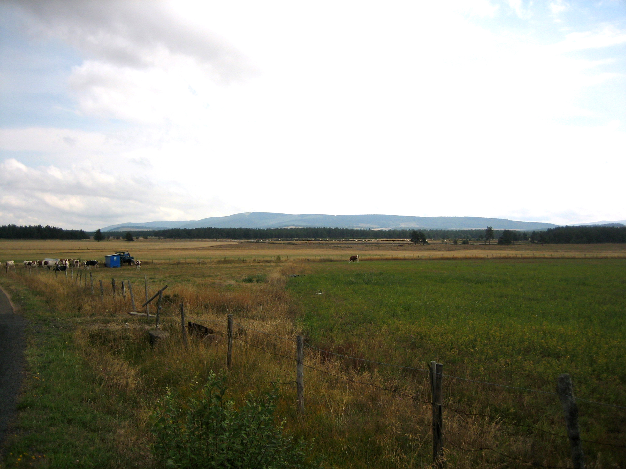 Plaine de Montbel en Lozère (France)